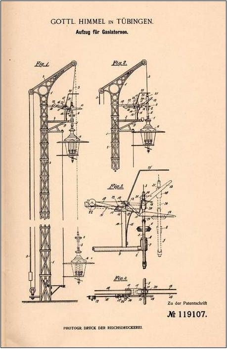 Patentschrift Nr 119107: Gottlob Himmel in Tübingen - Aufzug für Gaslaternen